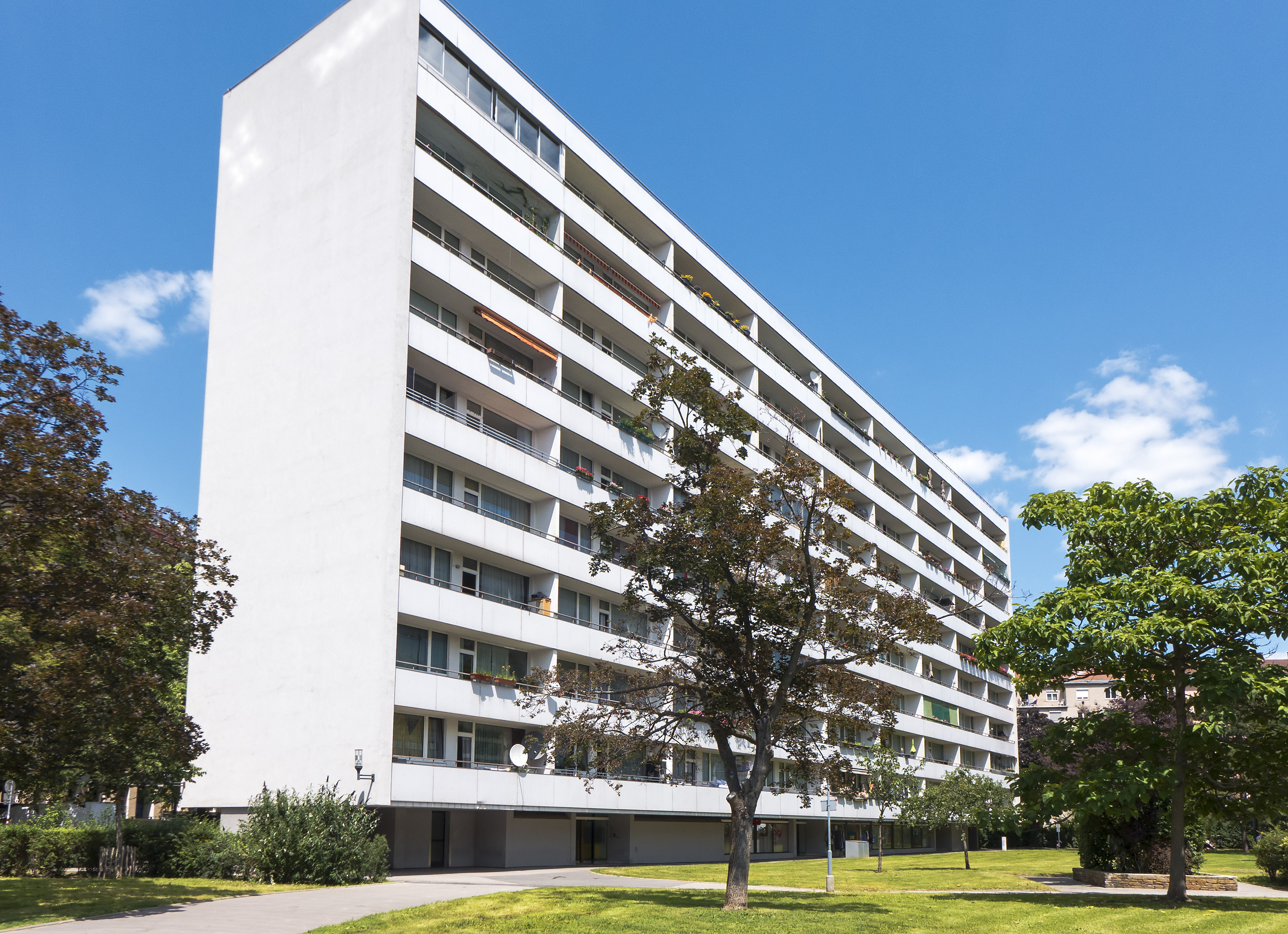 Wohnhausanlage Vorgartenstraße 158-170 in Wien 2